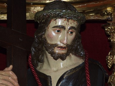 Santísimo Cristo de las Batallas, Desde 1940 se encuentra en la llamada capilla de Mosén Rubí (Ávila).